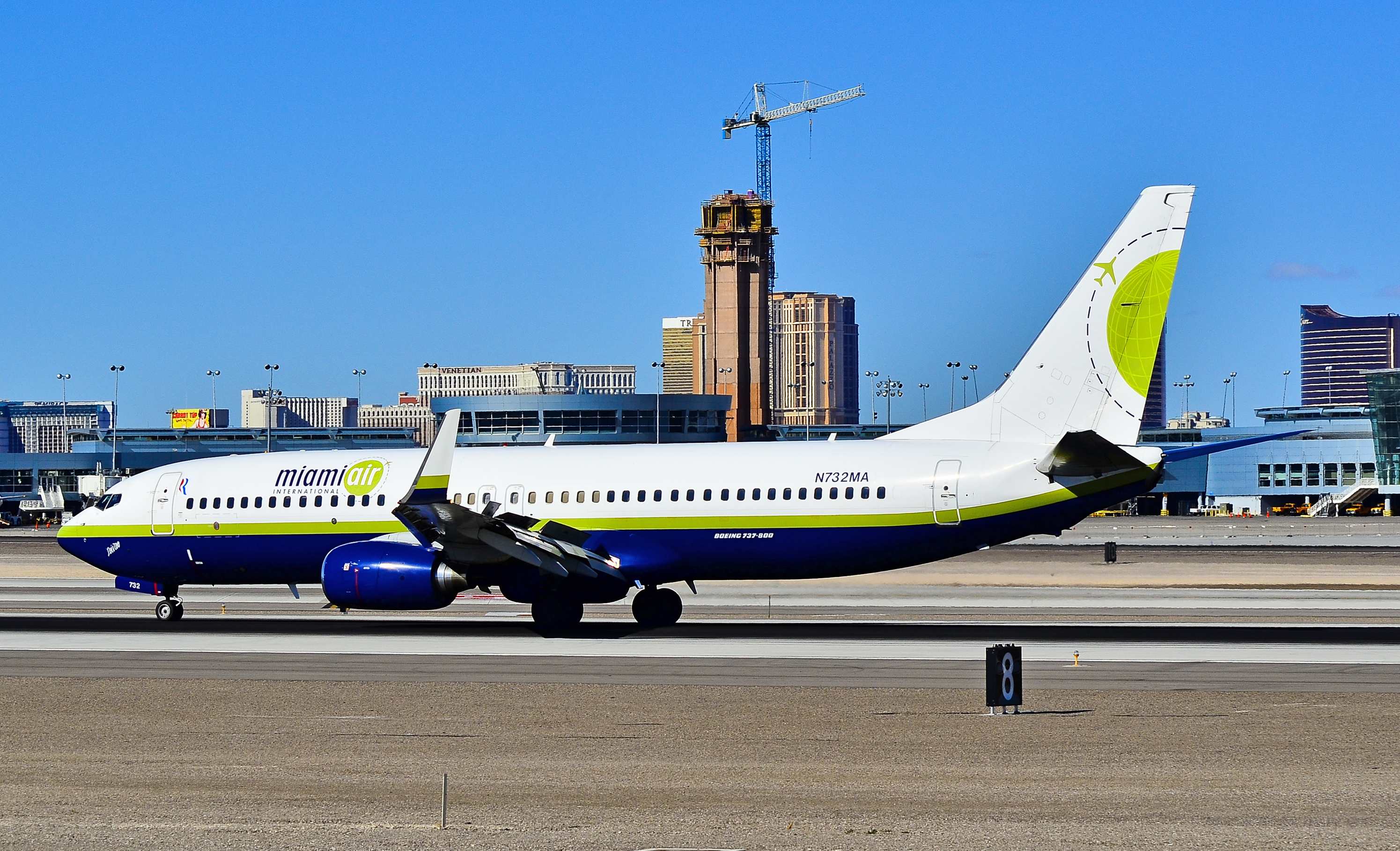 Las Vegas - McCarran International (LAS / KLAS) USA - Nevada, February 02, 2012 Photo: Tomás Del Coro